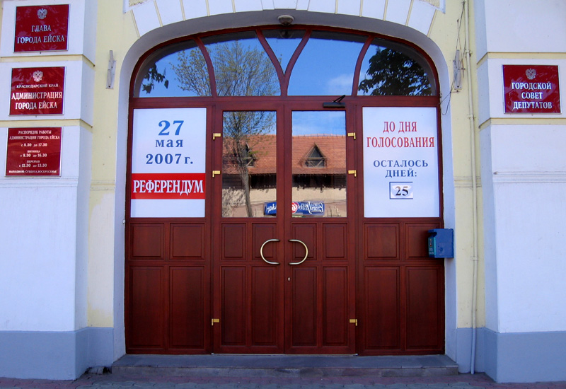 Ейск референдум об объединении